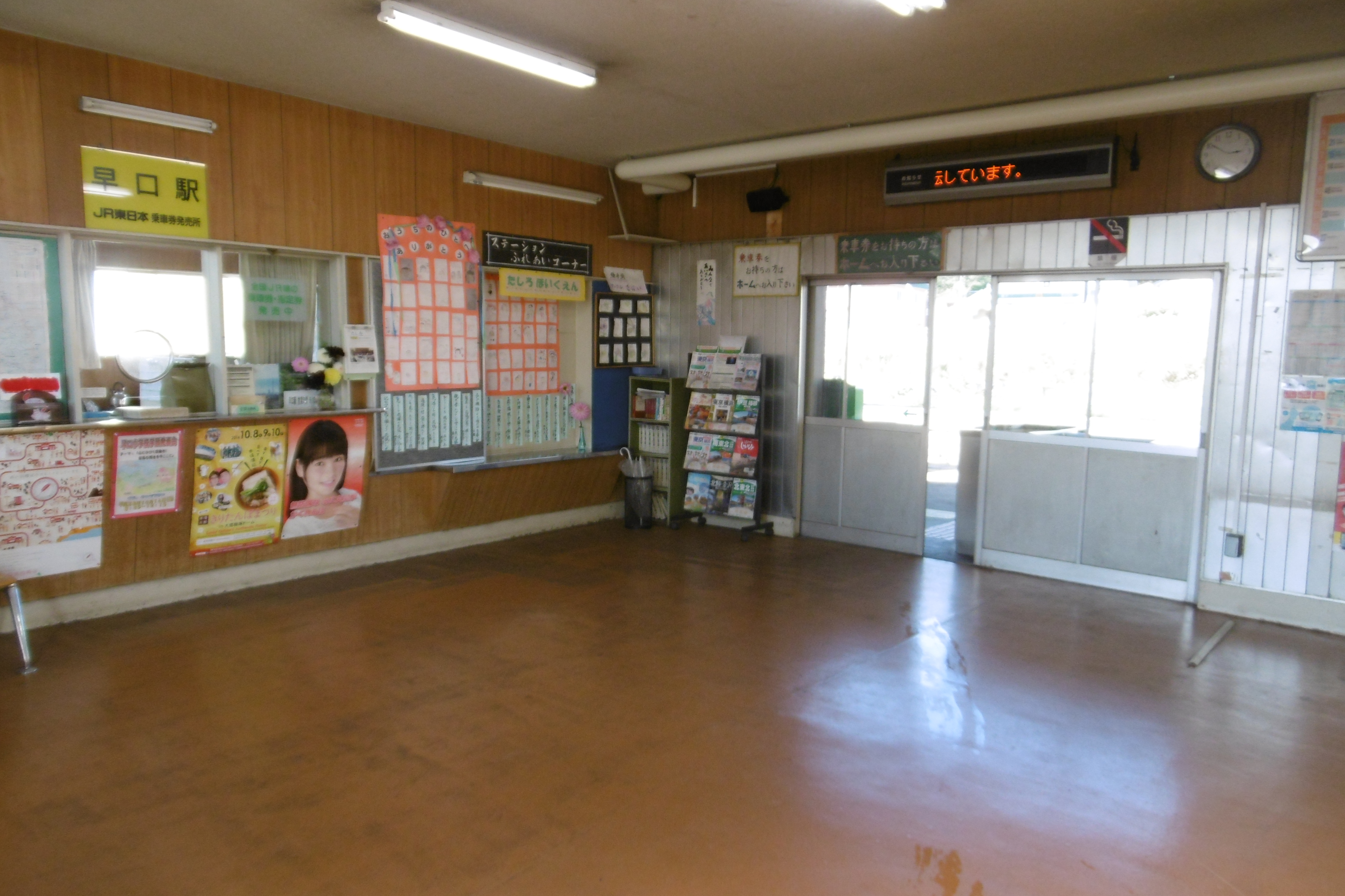 早口駅 待合室